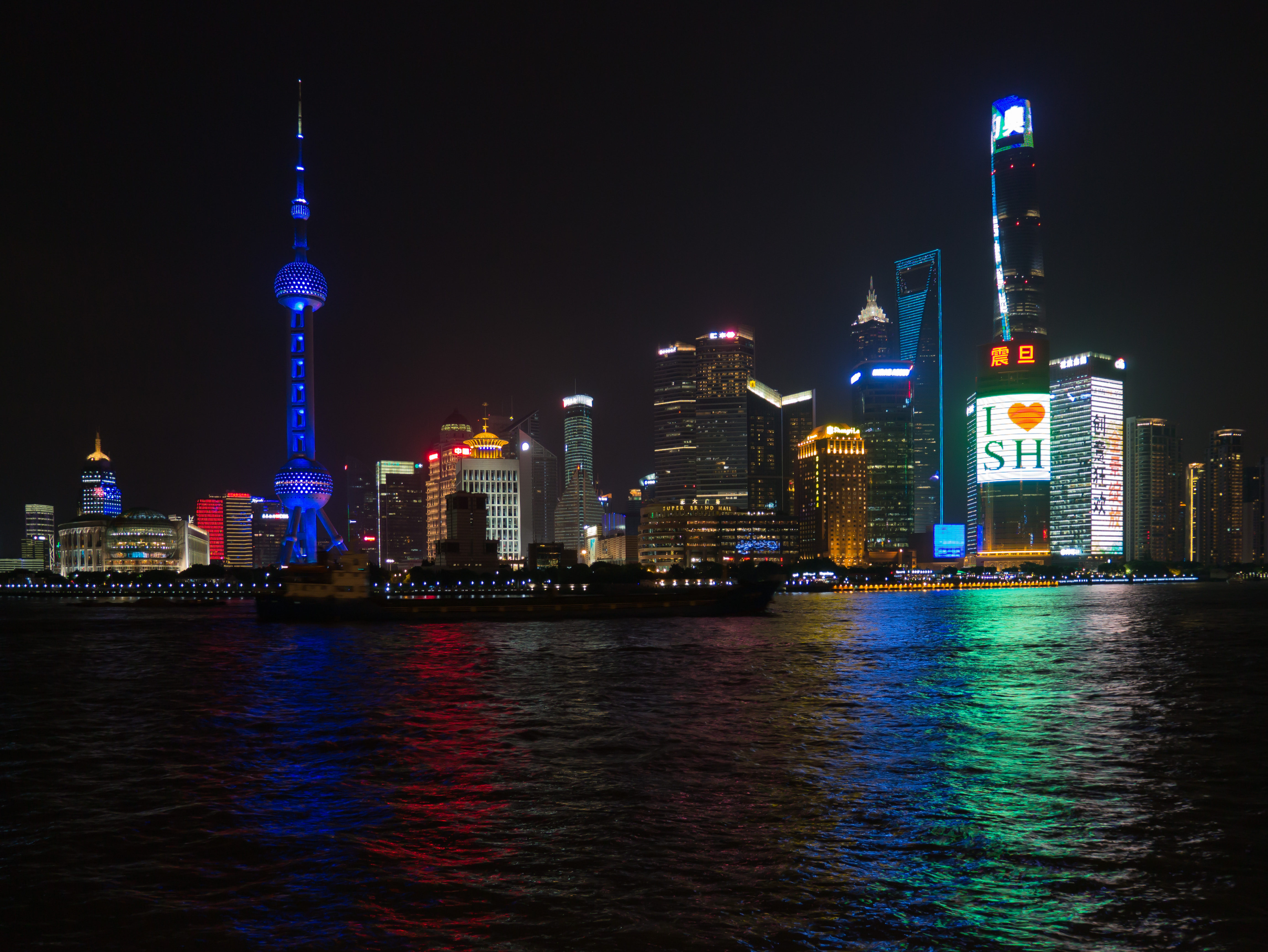 Shanghai, Skyline Pudong bei Nacht, August 2016